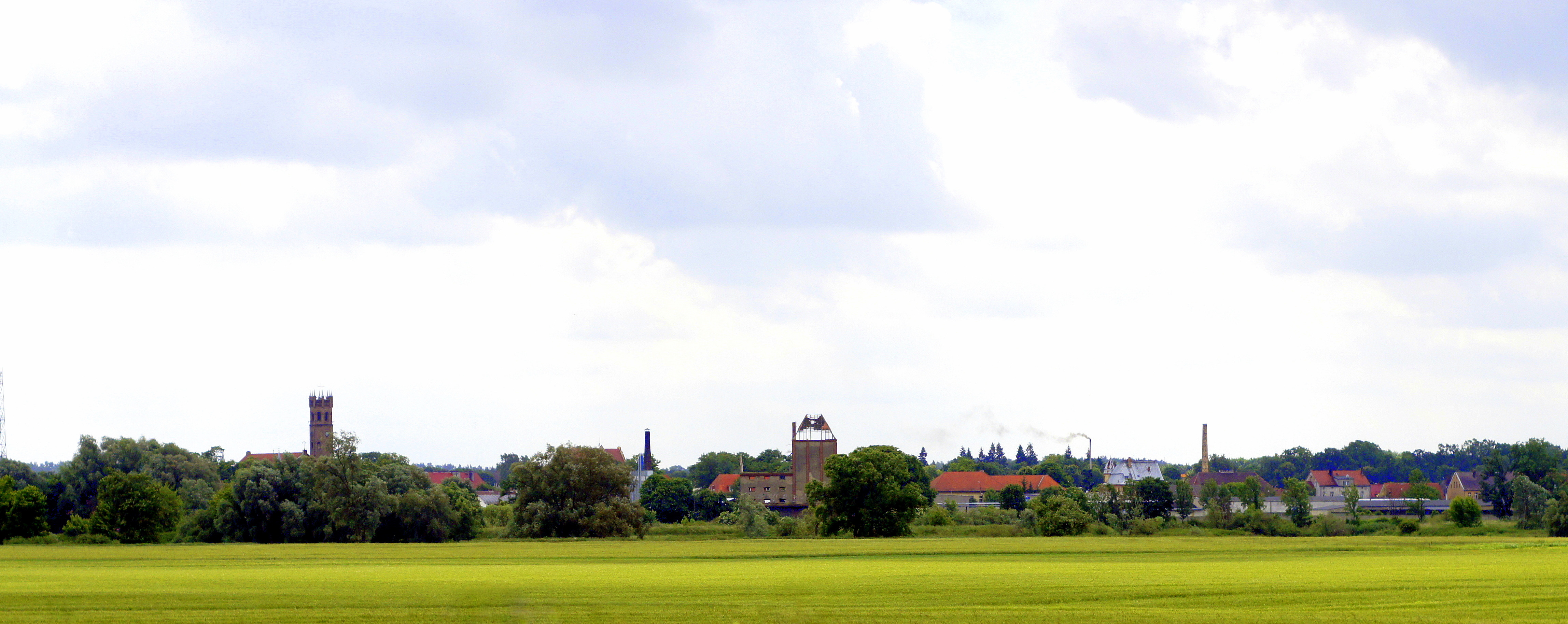 Panorama Skwierzyny